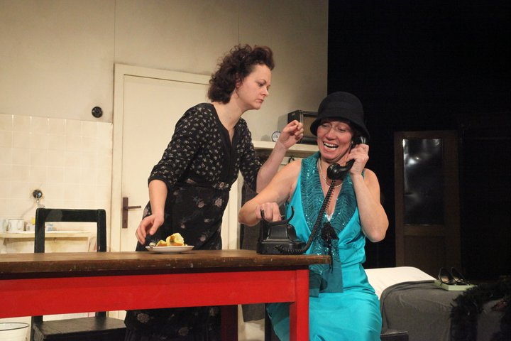 Snímek z inscenace "Kočičí hra" autora Istvána Örkényho. Na snímku Lucie Matoušková a Eva Reiterová.